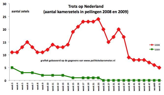 Uitslag peilingen 2008 en 2009 - Trots op Nederland - de grafiek is gebaseerd op cijfers van